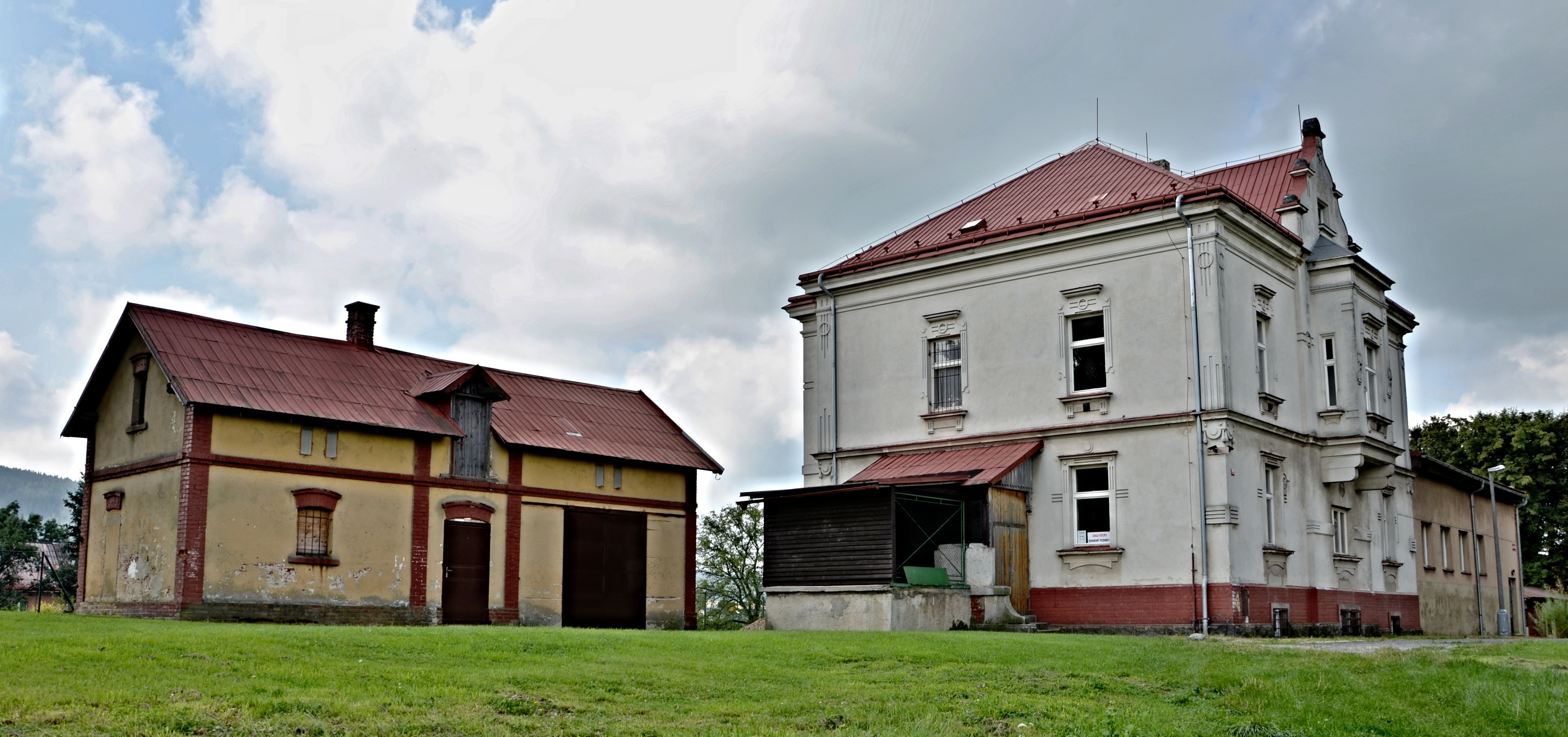 Ehemalige Dechant Pater Franz Jomrich Villa